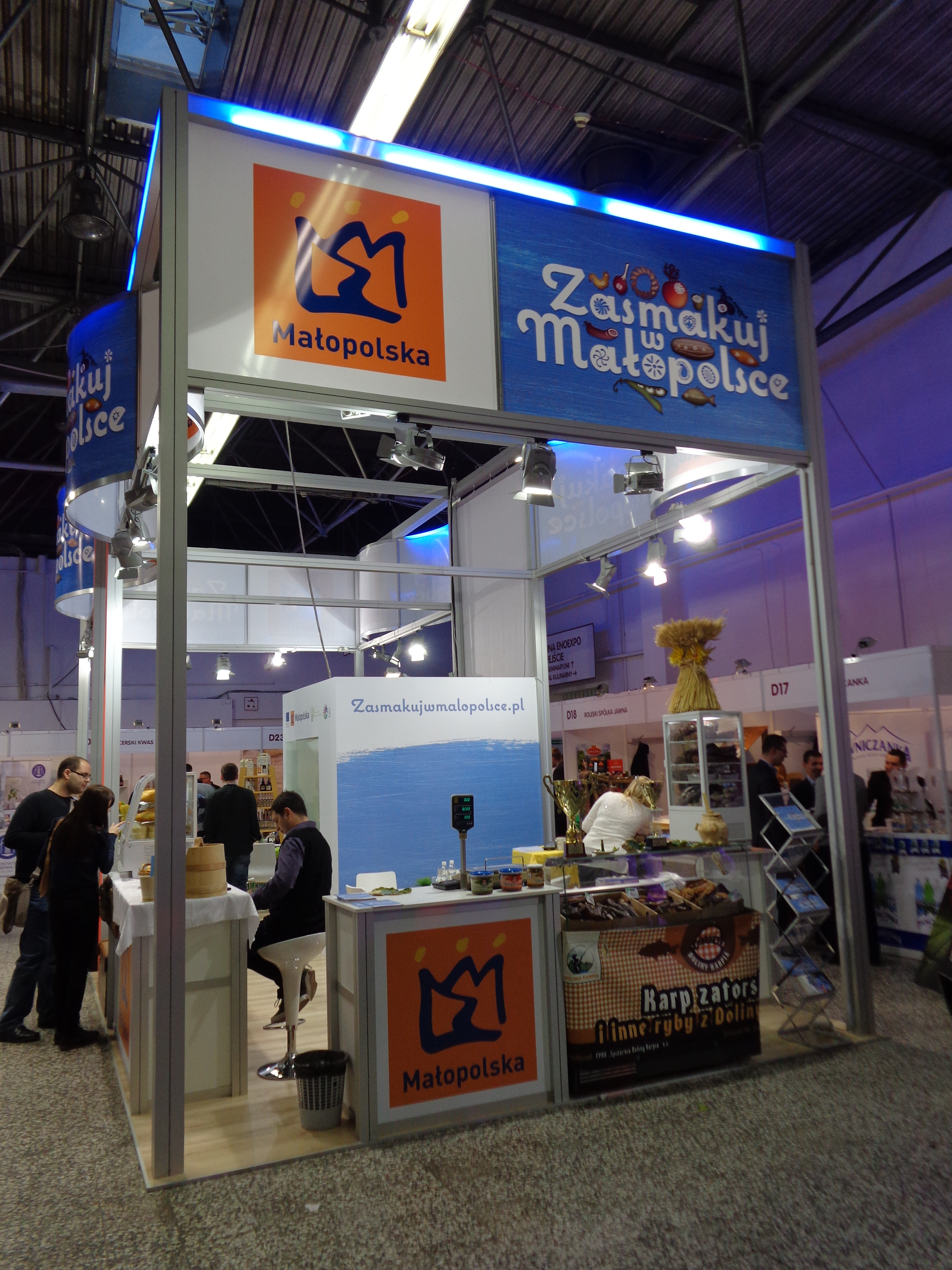 Stoisko Małopolski promujące turystykę kulinarną podczas Targów HORECA 2013 w Krakowie.